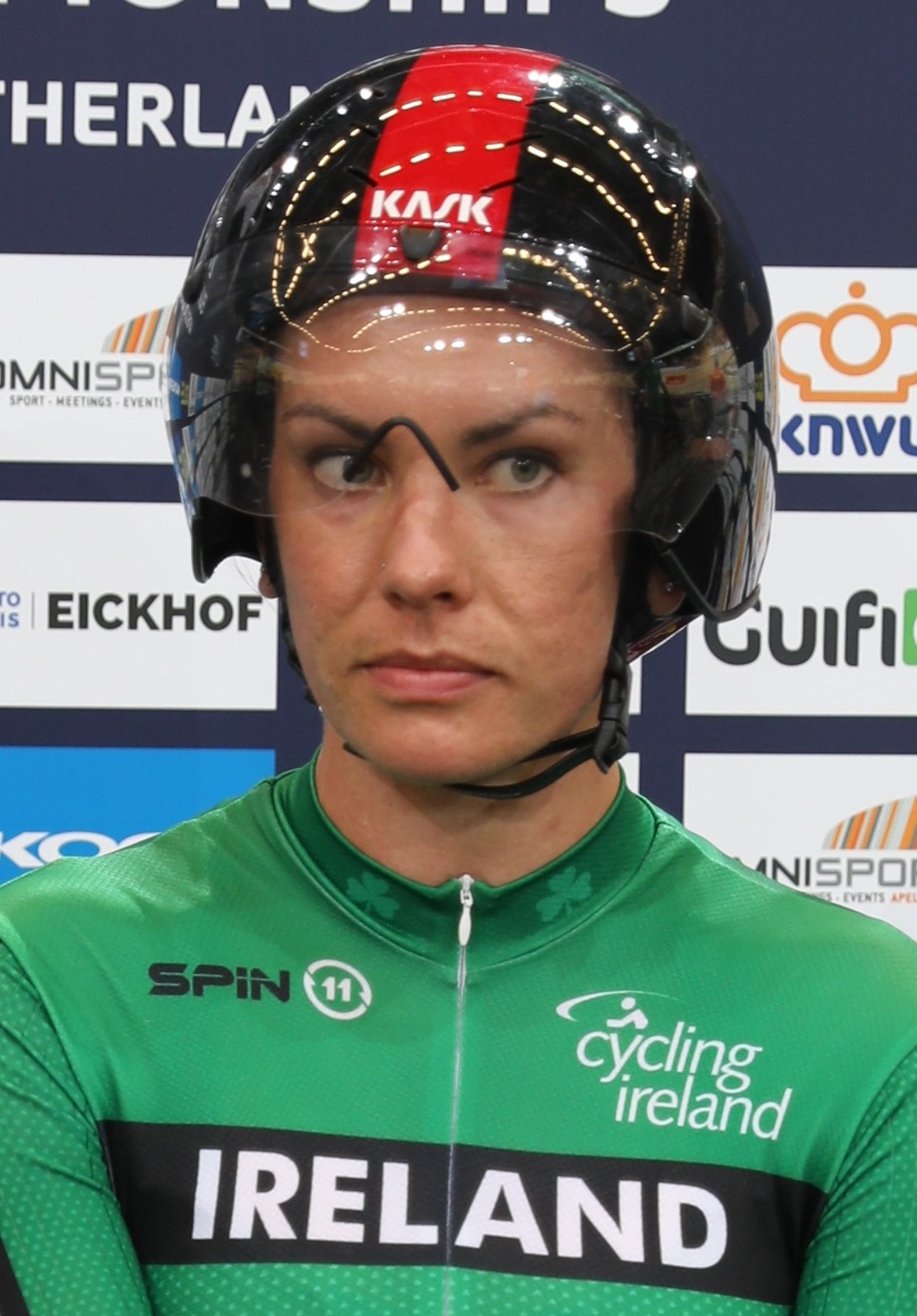 Kelly Murphy, irische Radsportlerin